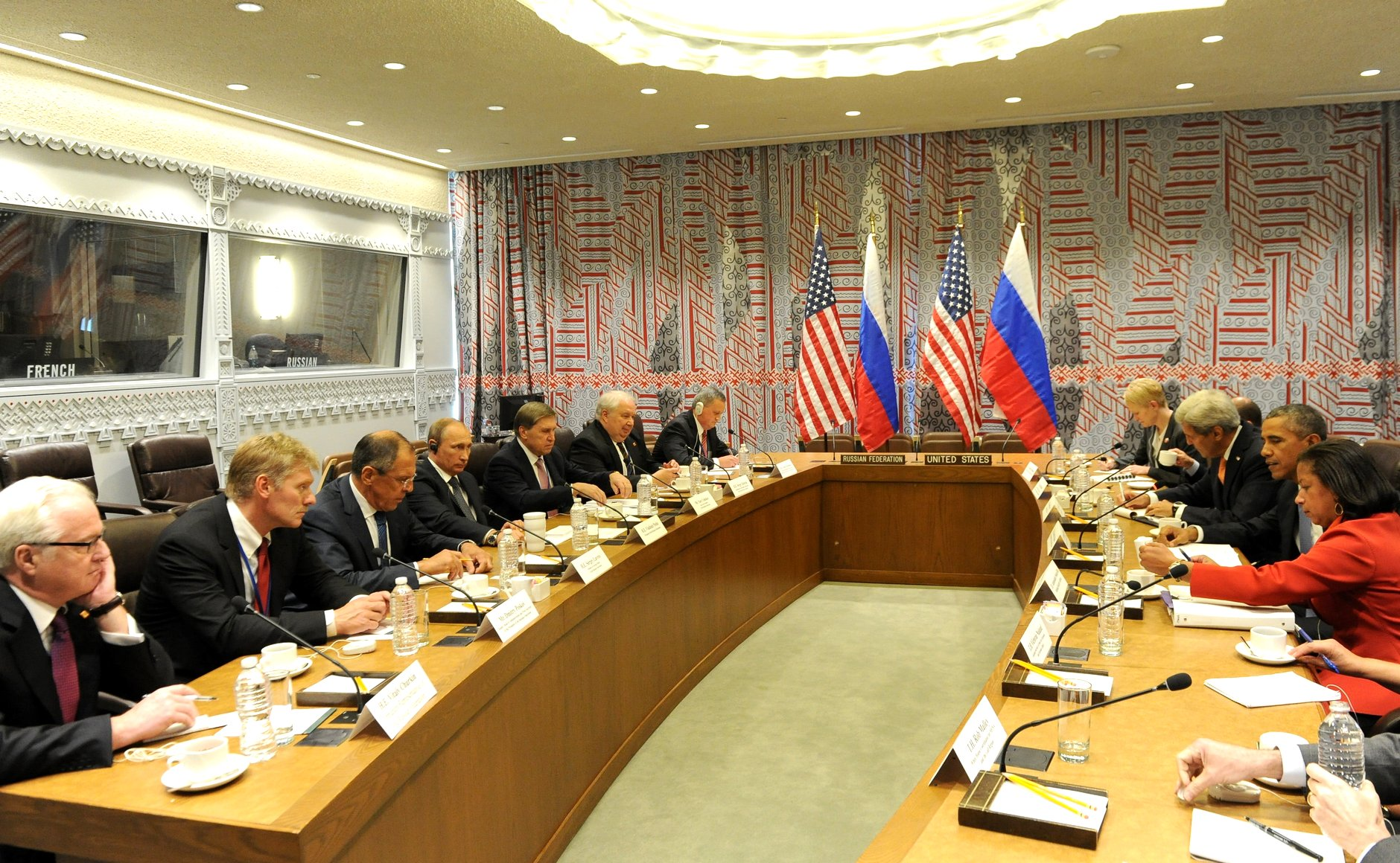 Встреча Президента России Владимира Путина с Президентом США Бараком Обамой